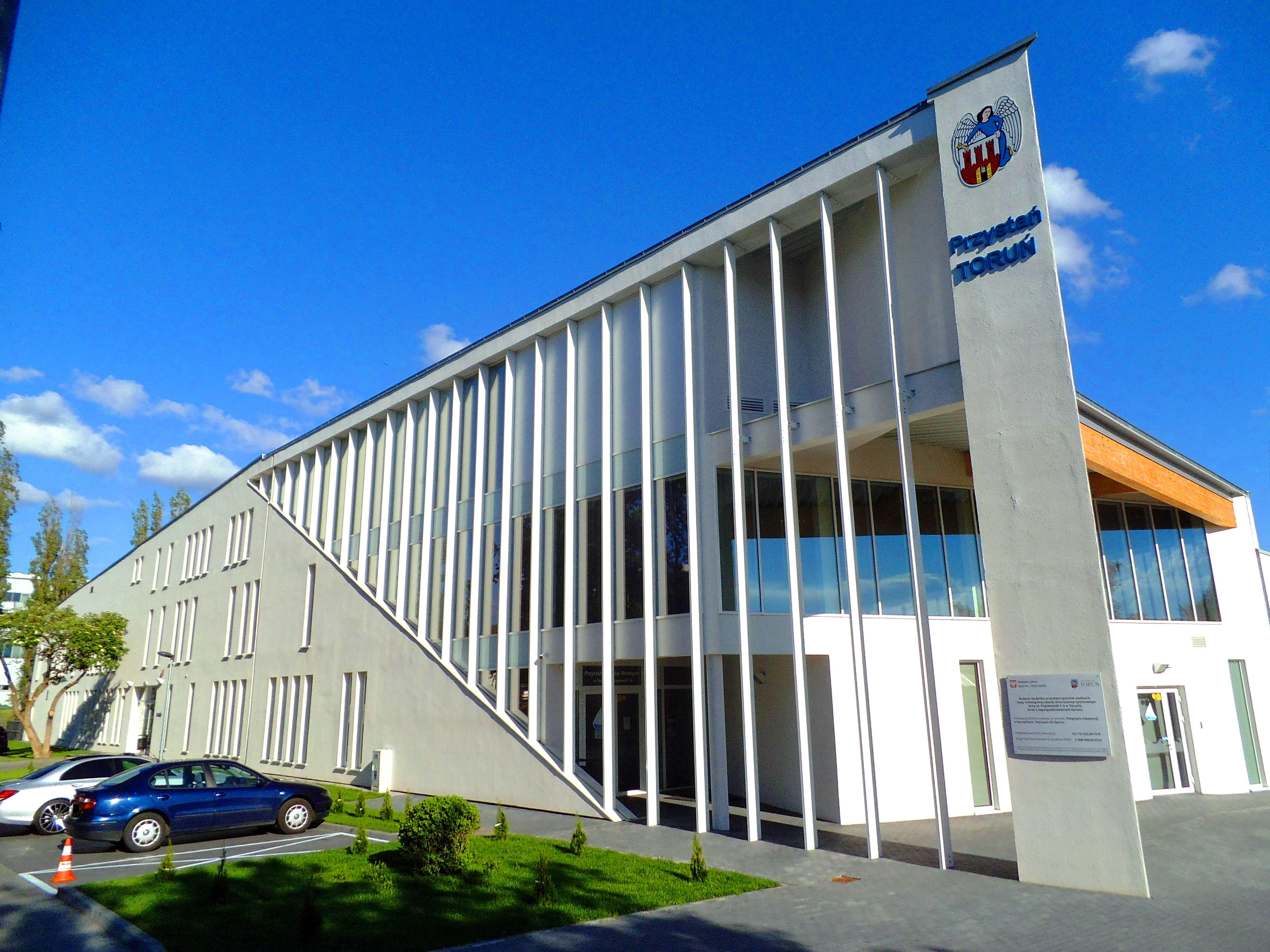 Przystań Toruń